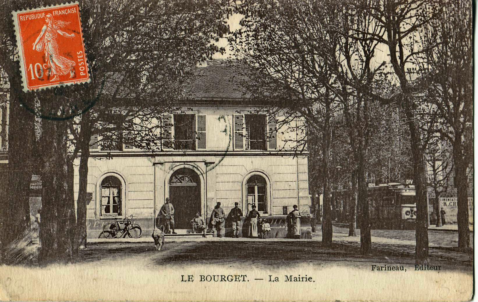 Carte postale ancienne éditée par Farineau : LE BOURGET - La MairieA droite du cliché, noter la motrice du tramway, ligne DbV de la STCRP